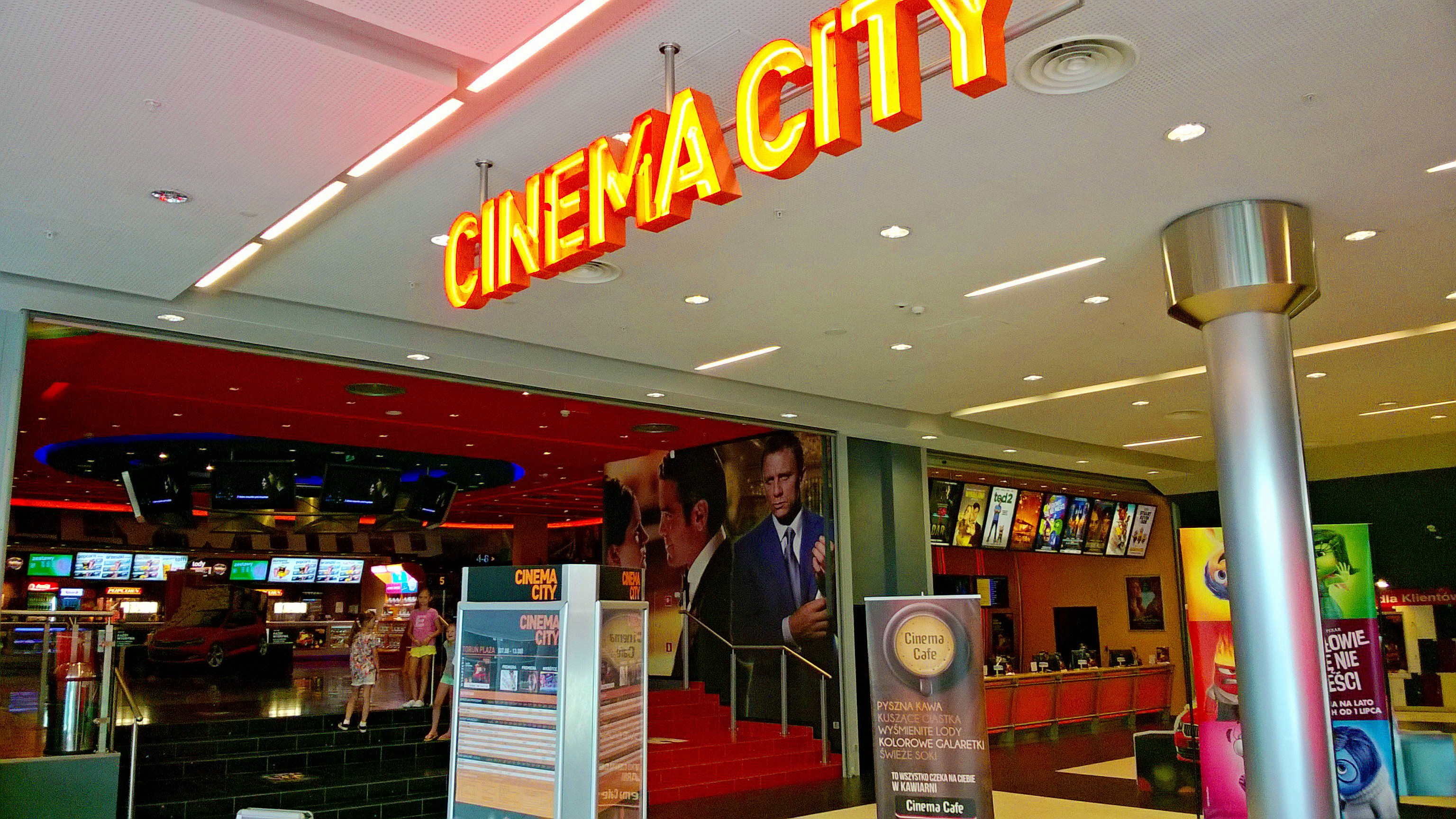 Cinema City w Toruniu44